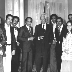 C'est l'éminent orthopédiste tunisien Mohamed El Kassab avec le grand professeur Robert Merle d'Aubigné lors de l'inauguration du centre national orthopédique de Ksar Saïd.